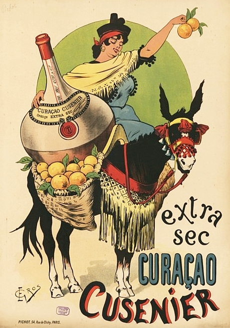 Affiche publicitaire : "Extra Sec. Curaçao Cusenier"